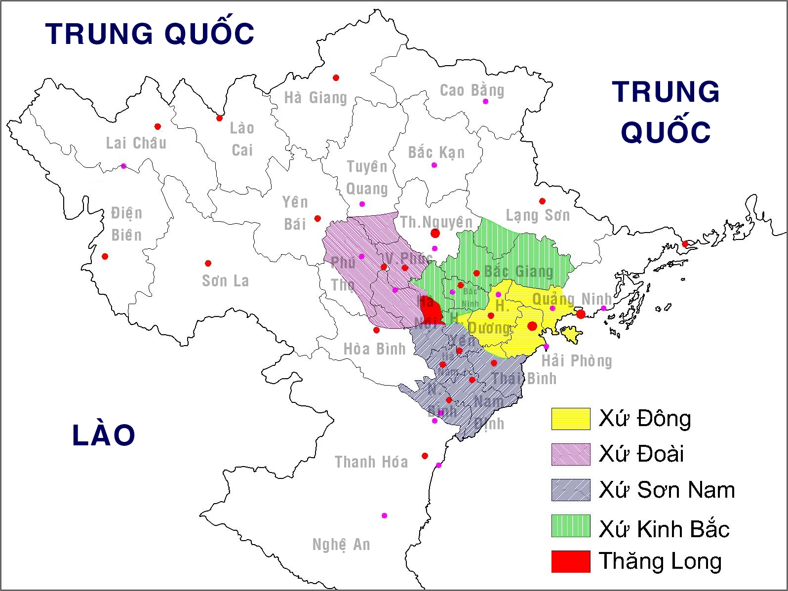 Bản đồ cương vực xứ Đông, xứ Đoài, xứ Sơn Nam và xứ Kinh Bắc thuộc phạm vi Thăng Long tứ trấn thời Hậu Lê và Mạc (1427 - 1789)